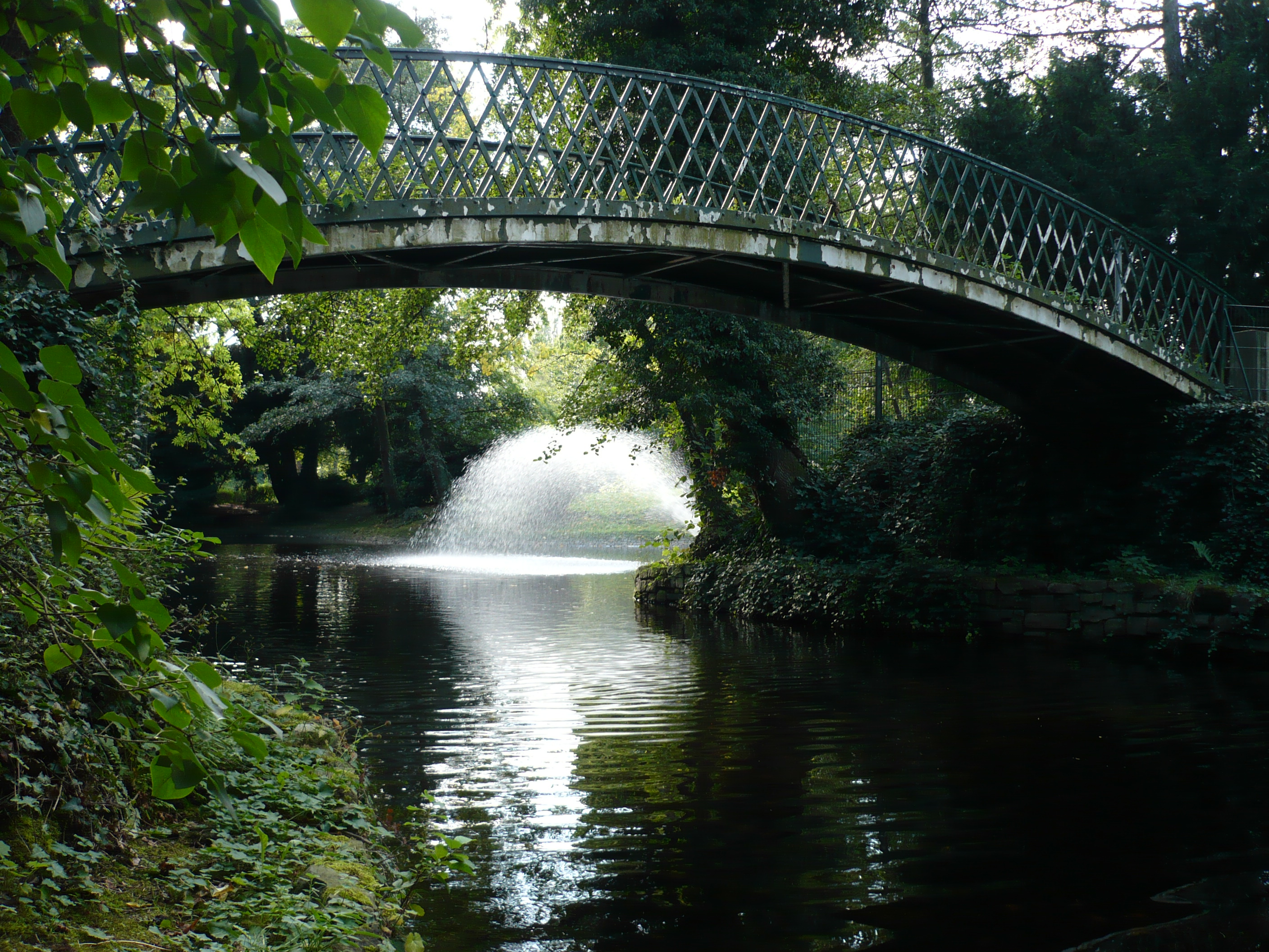 Aachener Kurpark, Schräge Fontäne und Springbrunnen im kleinen Weiher an der Brücke zum Stadtgarten